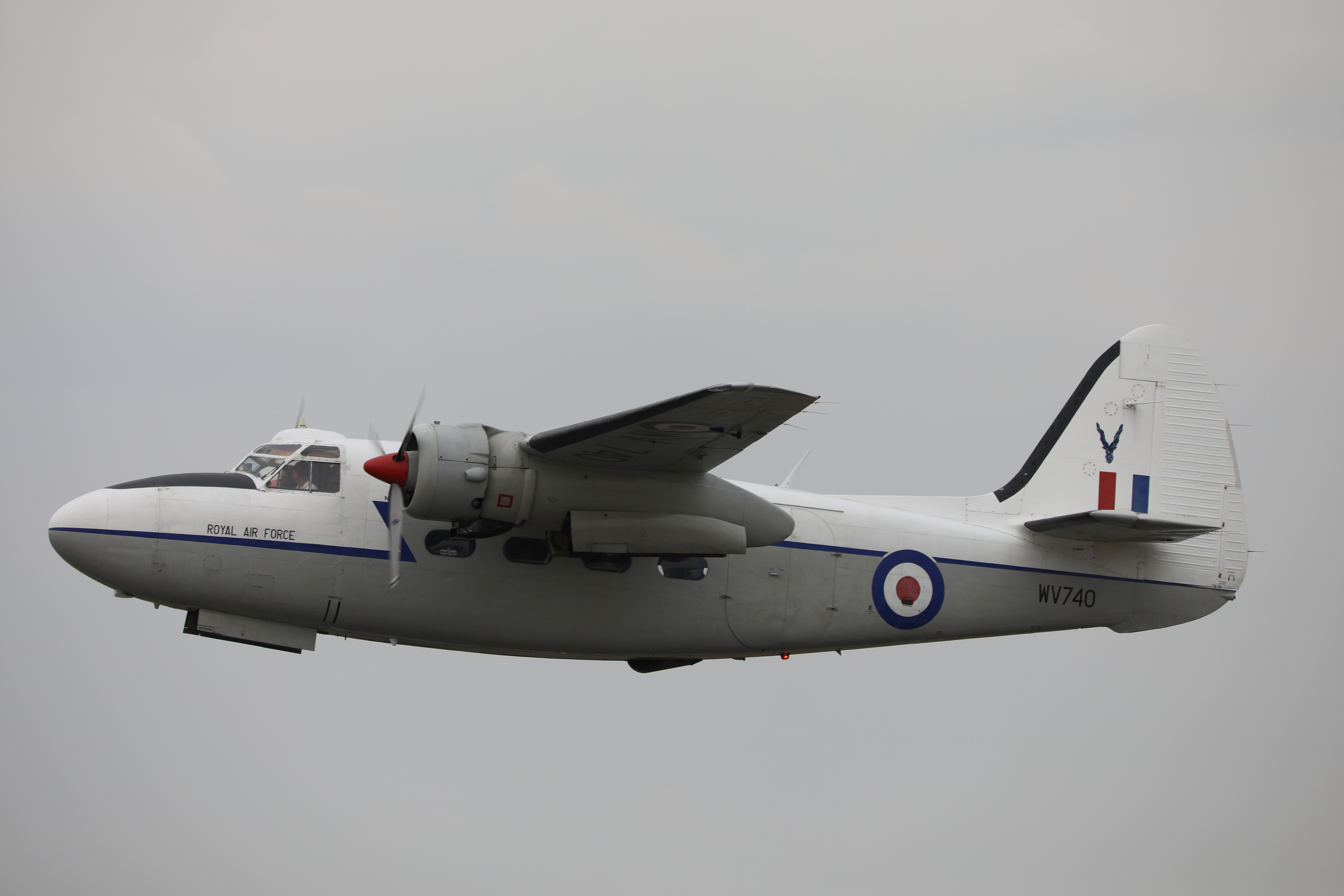 Percival Pembrole C.1 5D4_1151